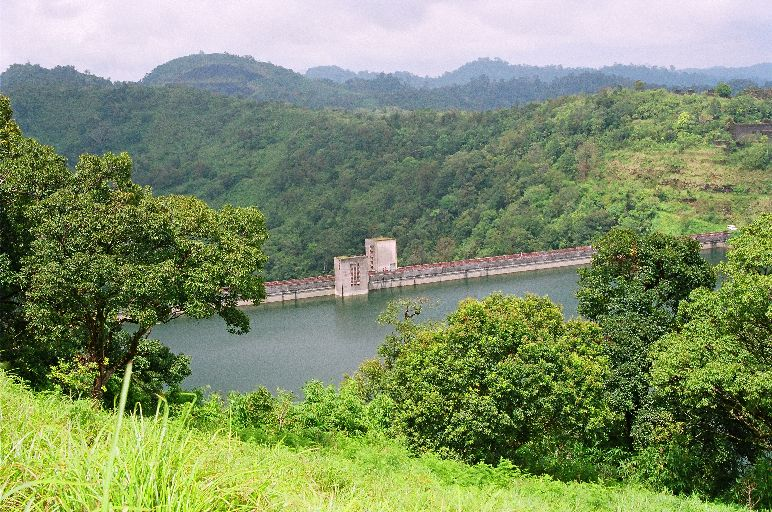 Kakki Dam